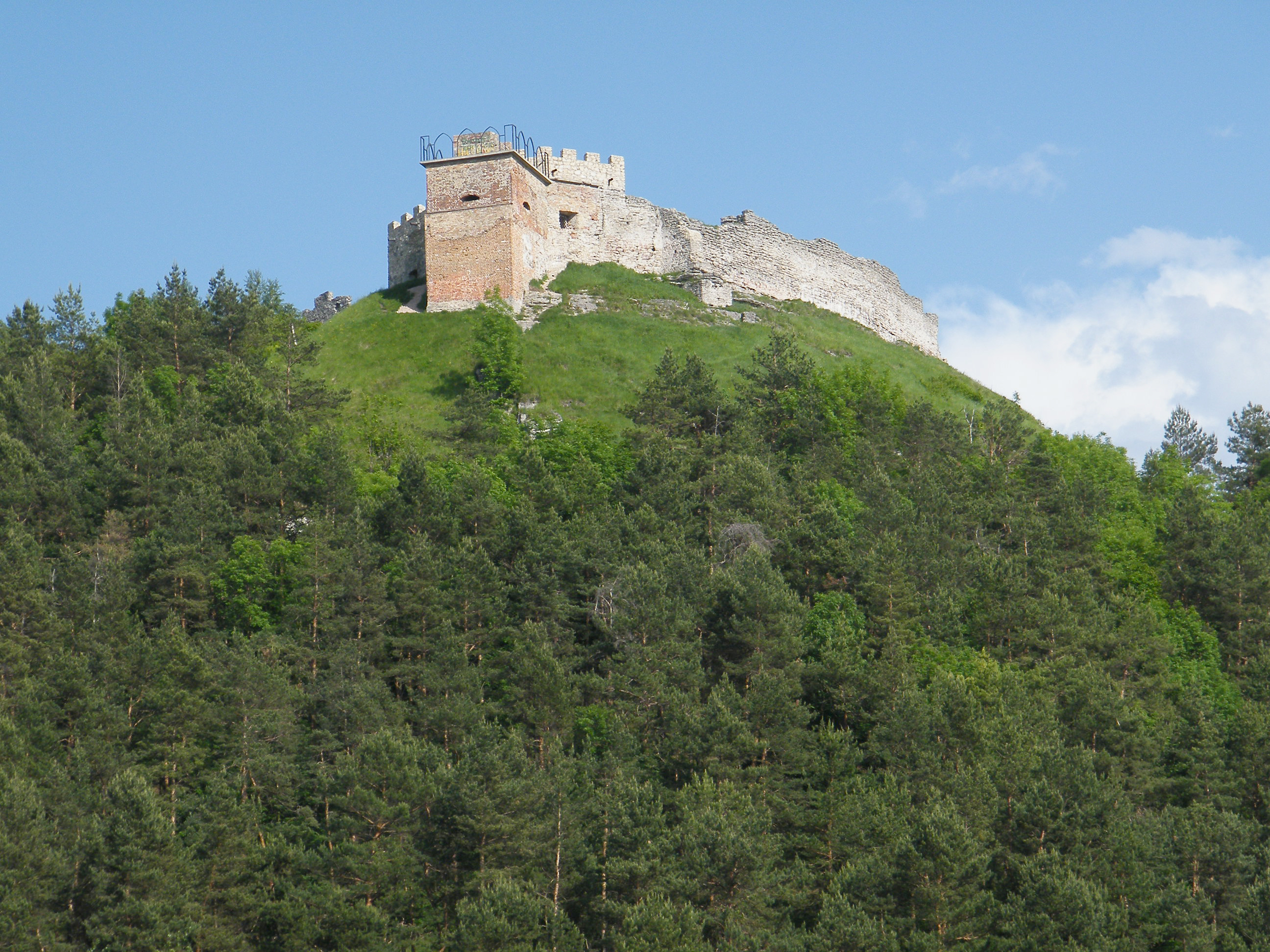 Кременецкий замок